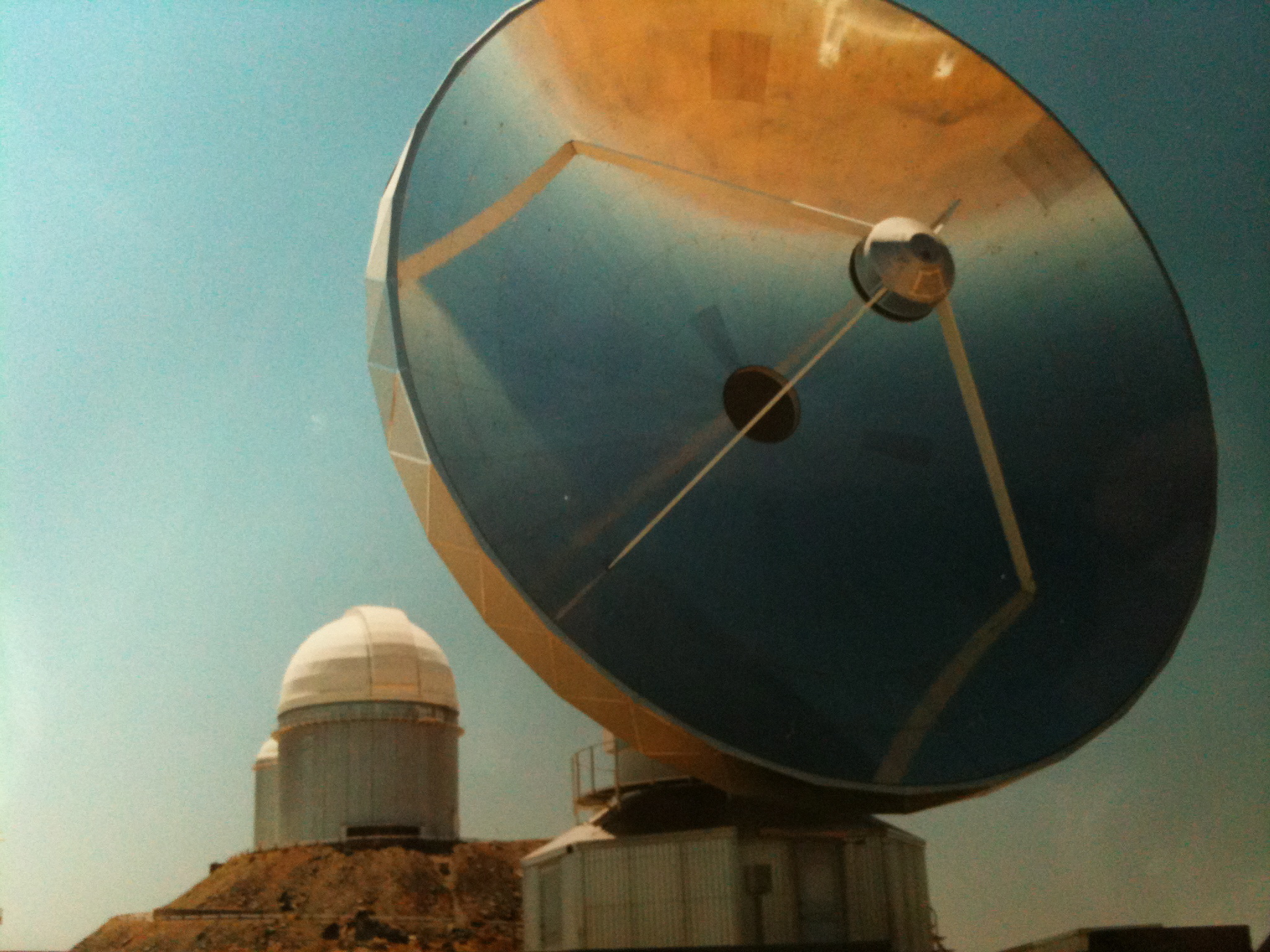 L'Observatoire de La Silla est un observatoire astronomique professionnel de l'ESO, situé dans le nord du Chili. le SEST 15 m Swedish-ESO Submillimetre Telescope. Mis hors-service en vue du Atacama Pathfinder Experiment, puis d'ALMA.